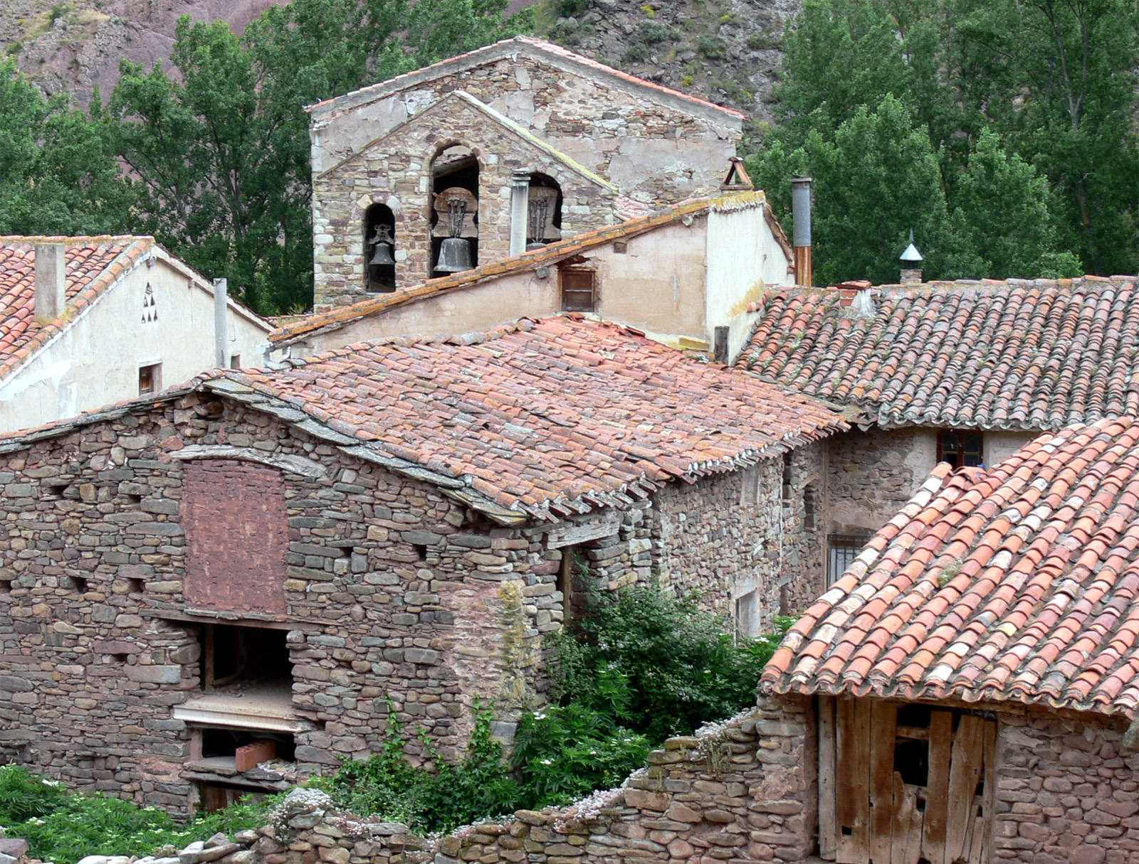 Robres del Castillo, municipio de La Rioja, España.